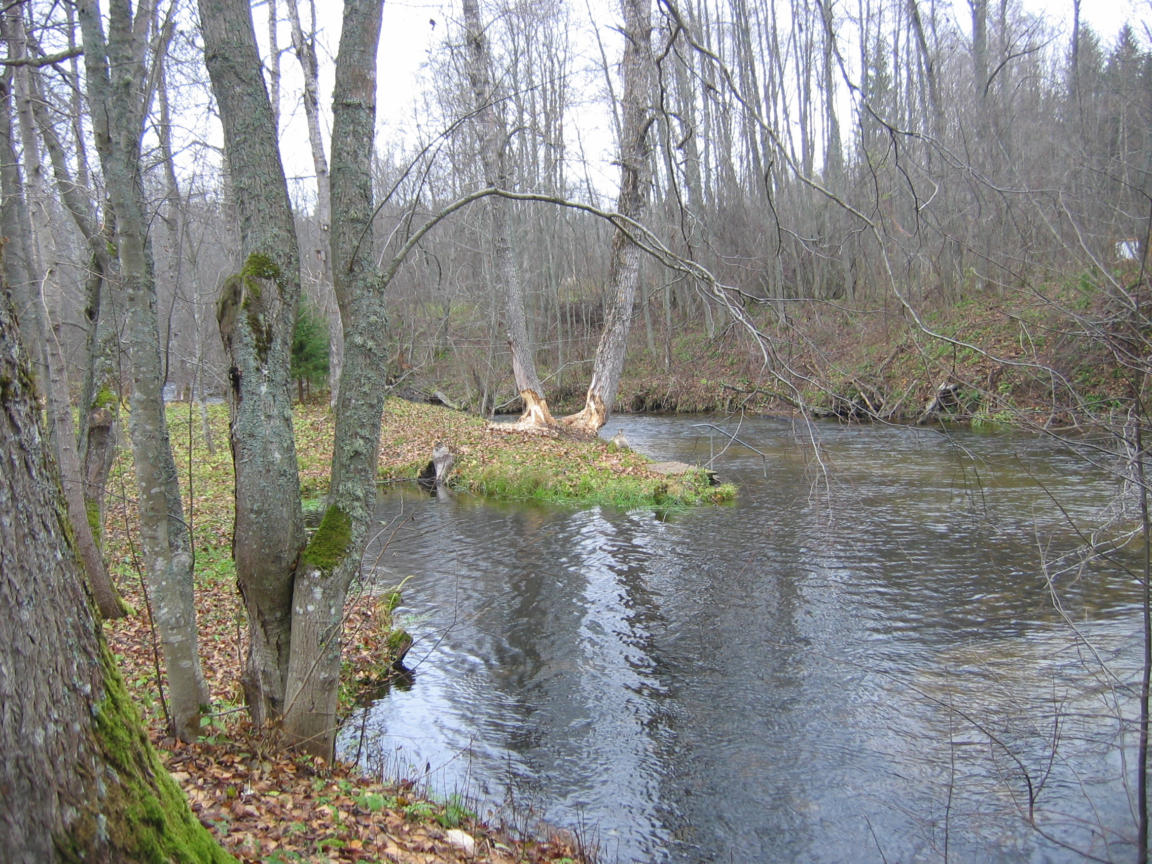 Река Валдайка, октябрь 2011, хорошо видны деревья, подгрызенные бобрами